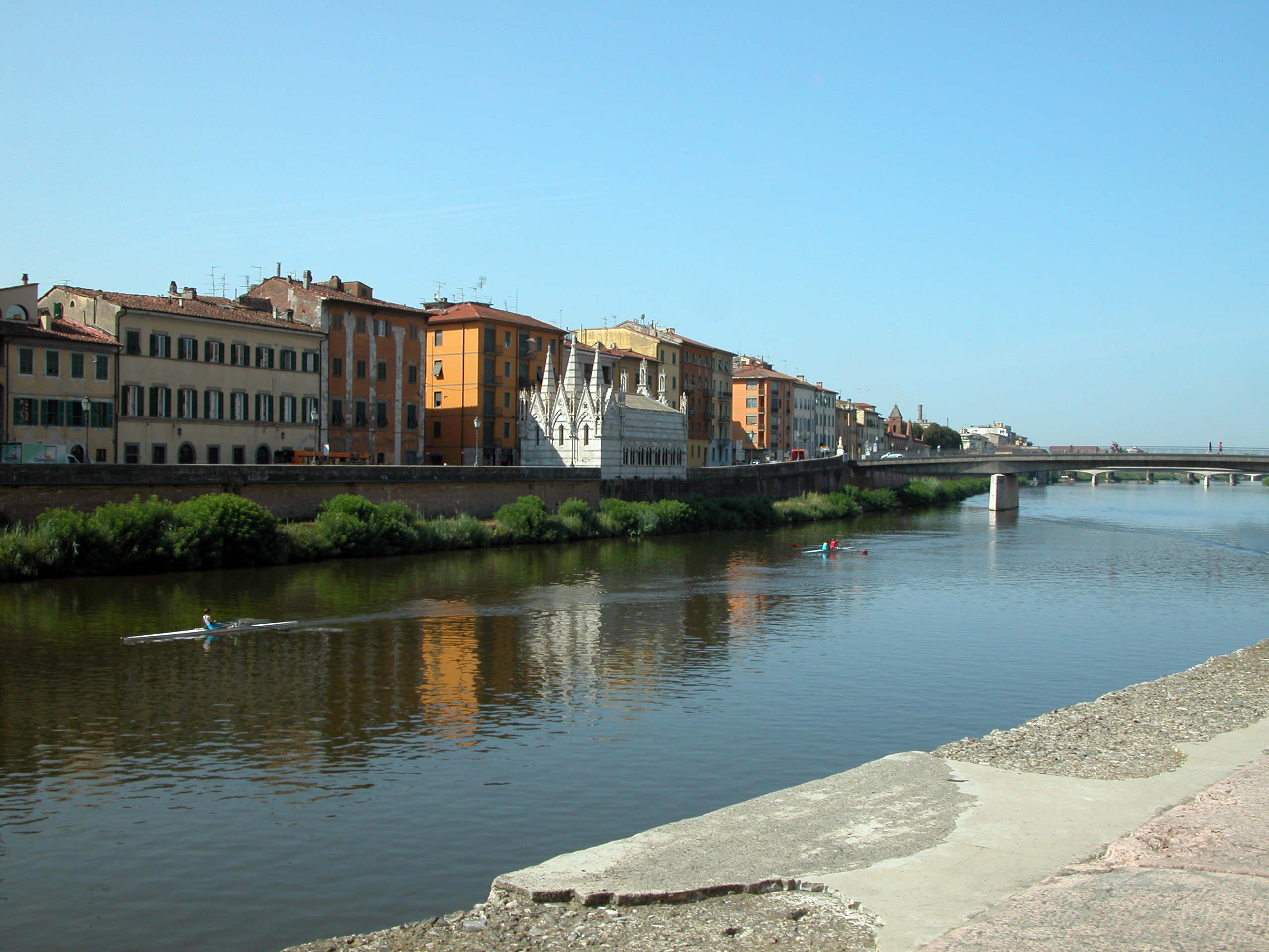 Le fleuve Arno passant à Pise et l'église Santa maria della Spina